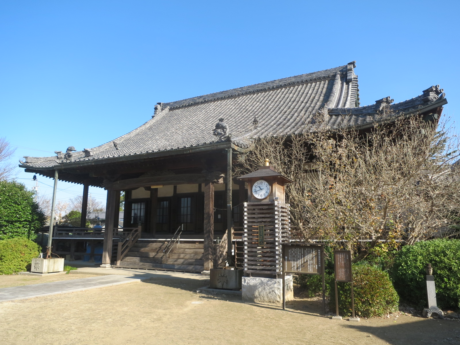 岡崎市 浄光寺